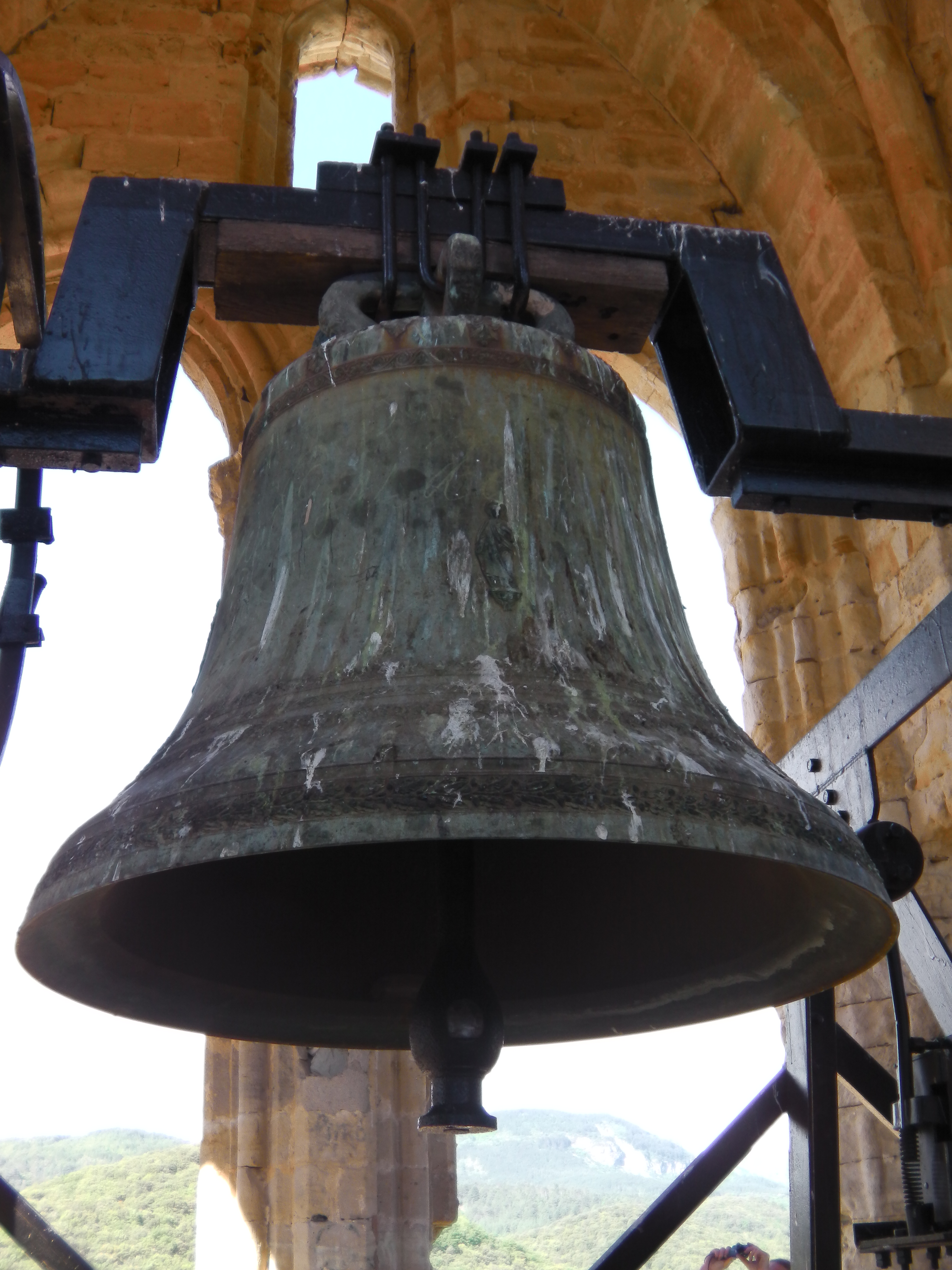 Cloche n°3 de la cathédrale Saint-Fulcran de Lodève (Hérault, France)